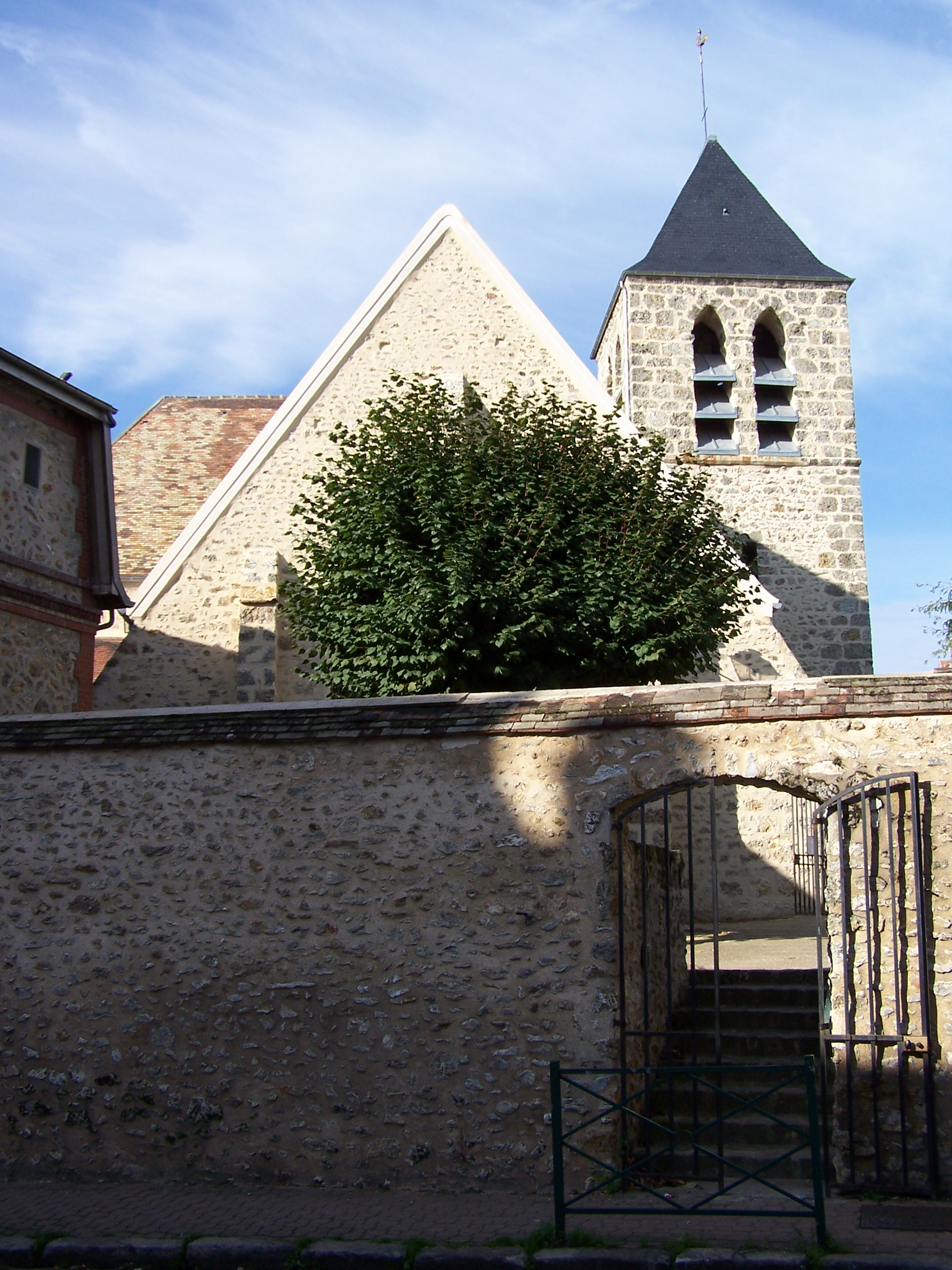 Église des Essarts-le-Roi (Yvelines, France)